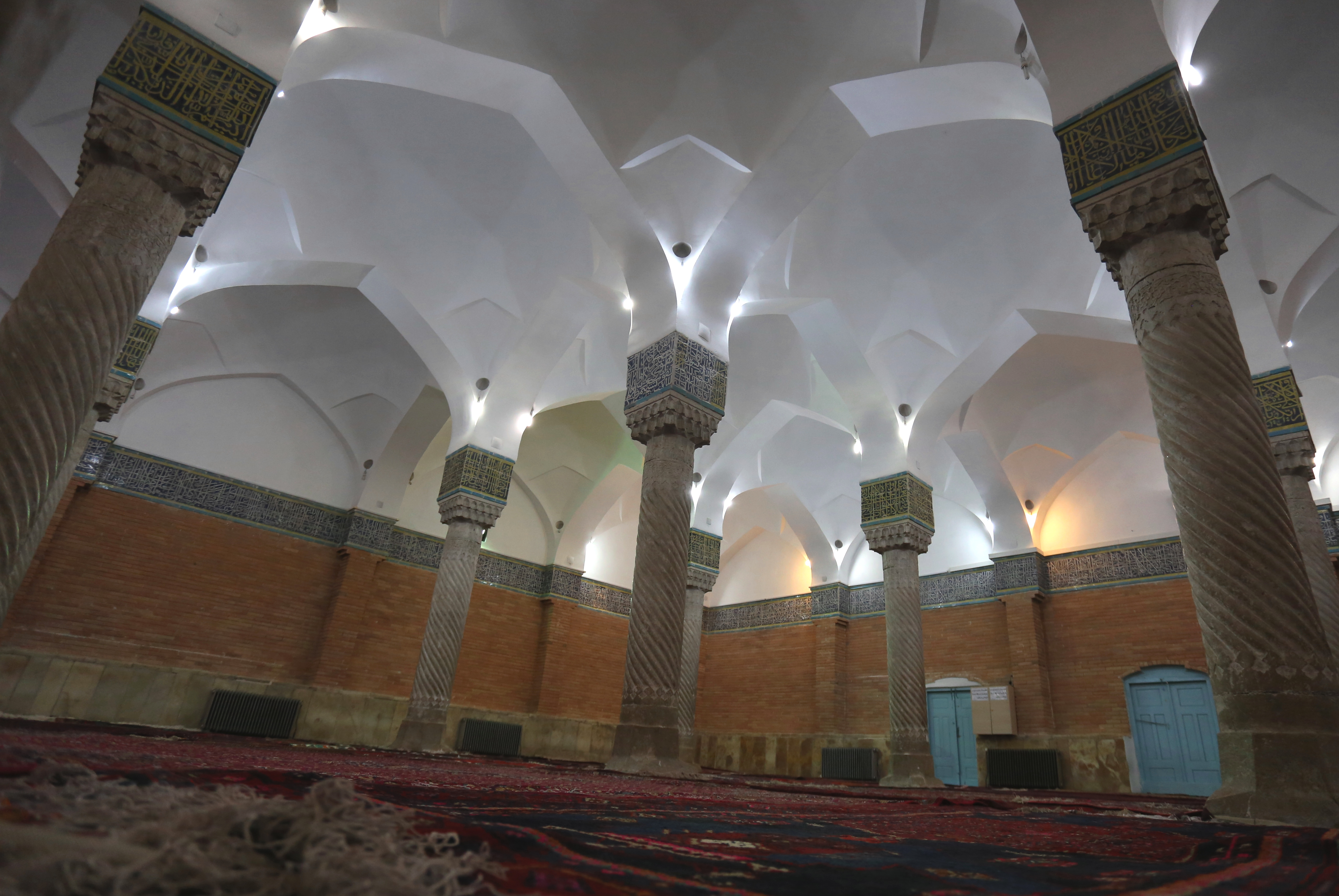 مسجد جامع (مسجد دارالاحسان)